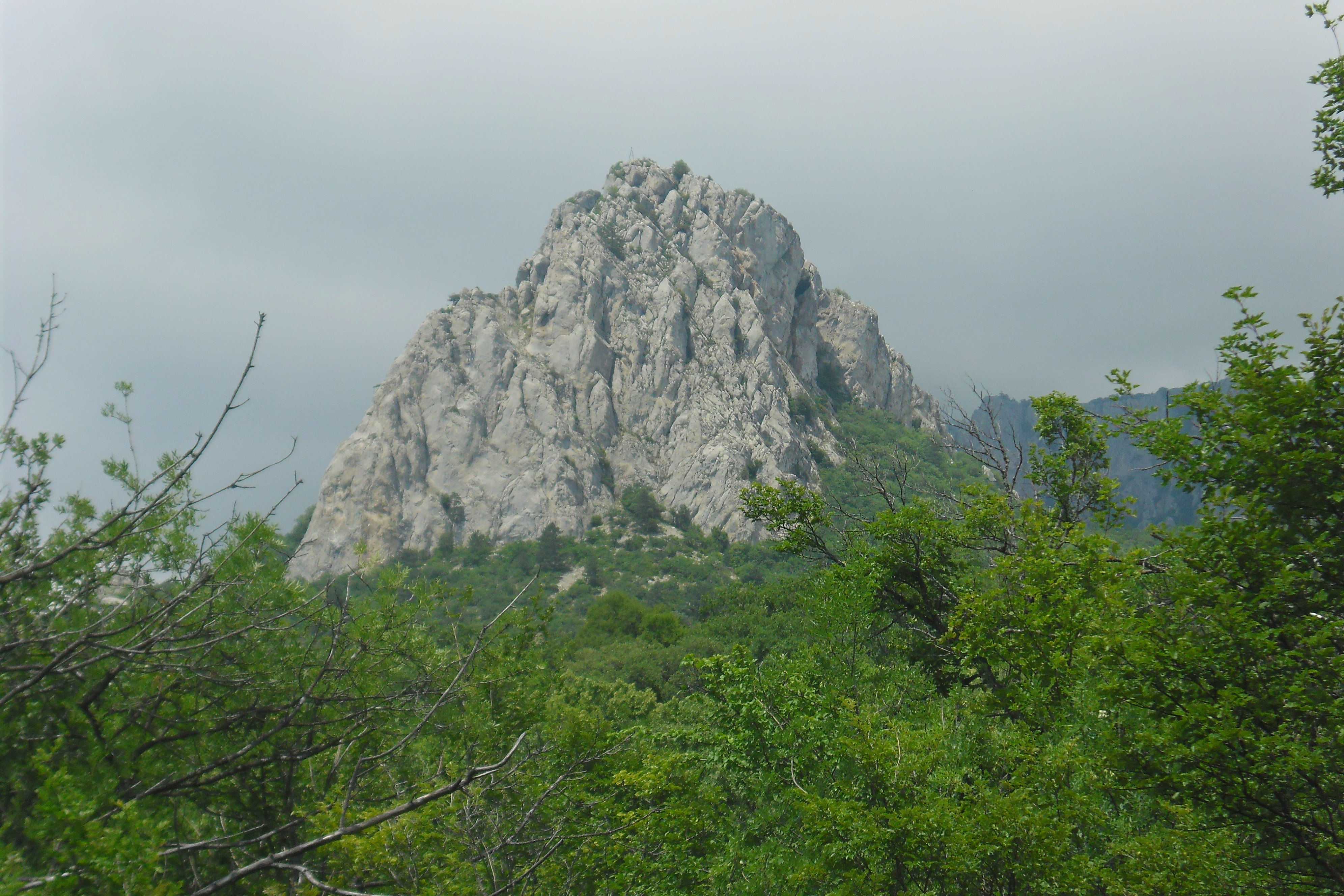 Фото